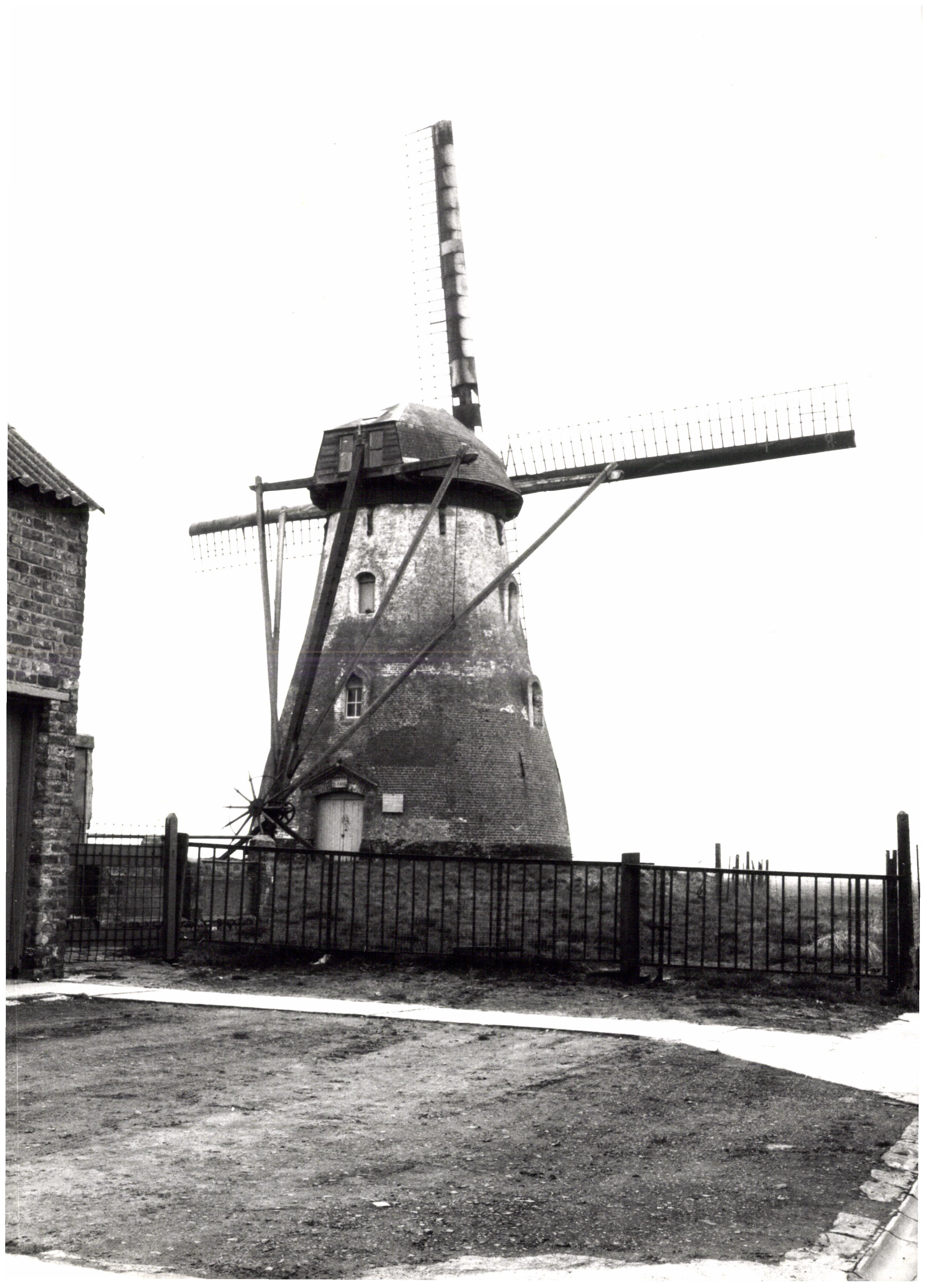 Windmolen Sint-Karelsmolen